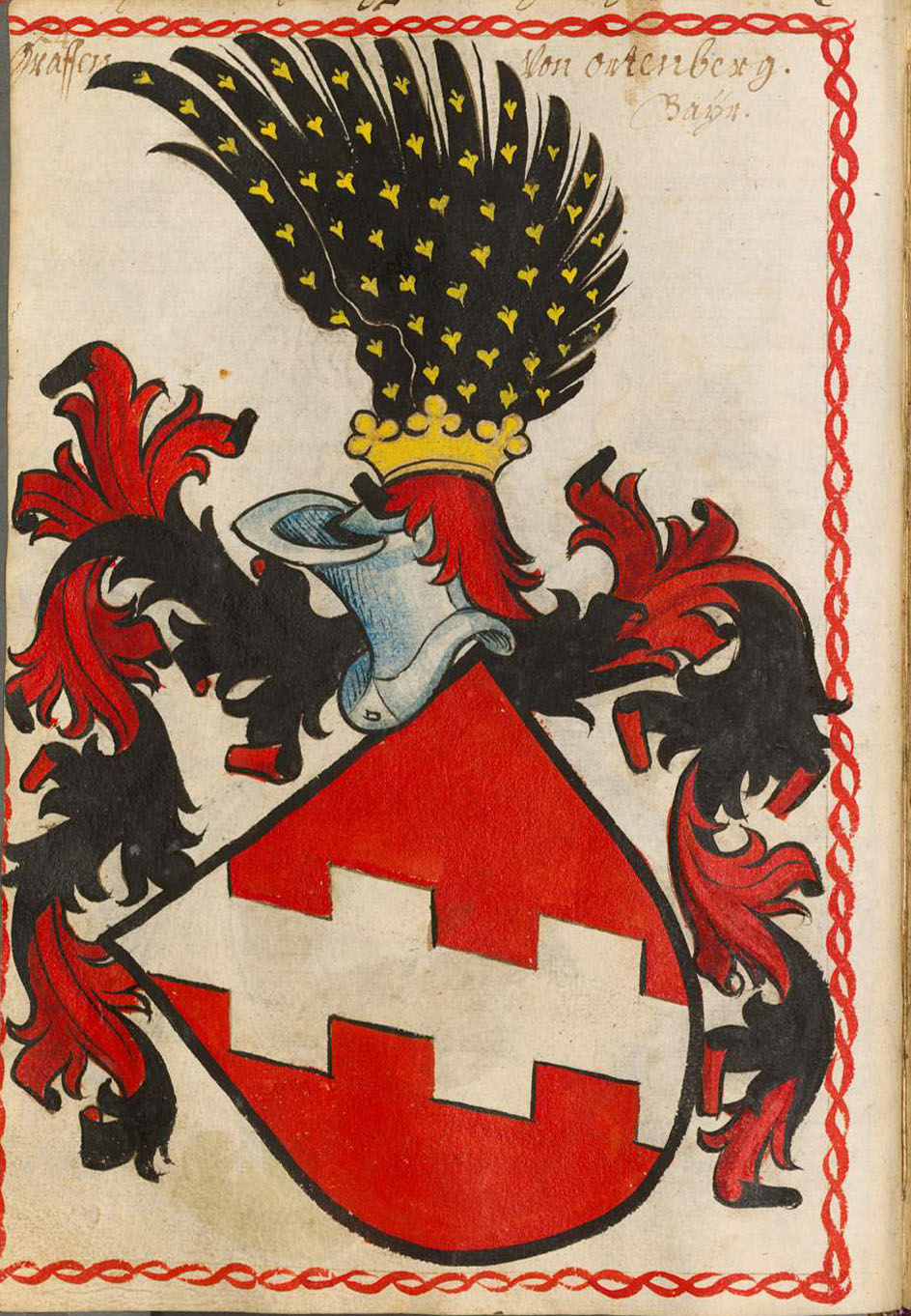 Scheibler'sches Wappenbuch , älterer Teil Bayern Ortenberg